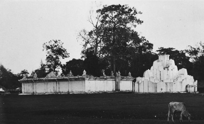 Foto. De gunongan is gebouwd in de vorm van een berg. Ze maakte deel uit van het lusthof Taman Sari en werd in opdracht van sultan Iskander Moeda gebouwd voor zijn Maleisische vrouw. Achter de gunongan ligt het graf van sultan Iskander Thani.. De gunongan en het graf van sultan Iskander Thani in Koetaradja